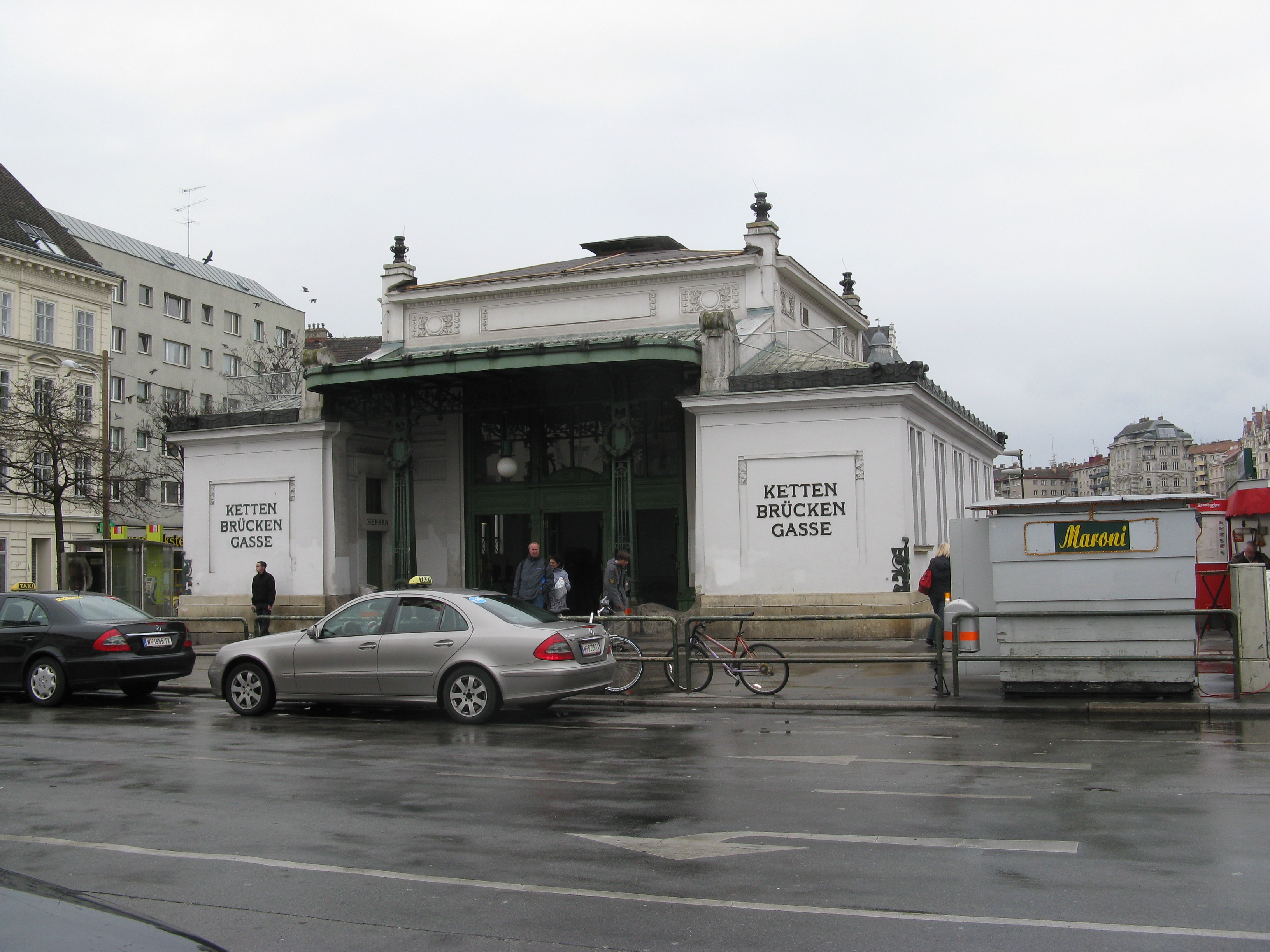 U-Bahnhof Kettenbrückengasse (Wien) designed by Otto Wagner.